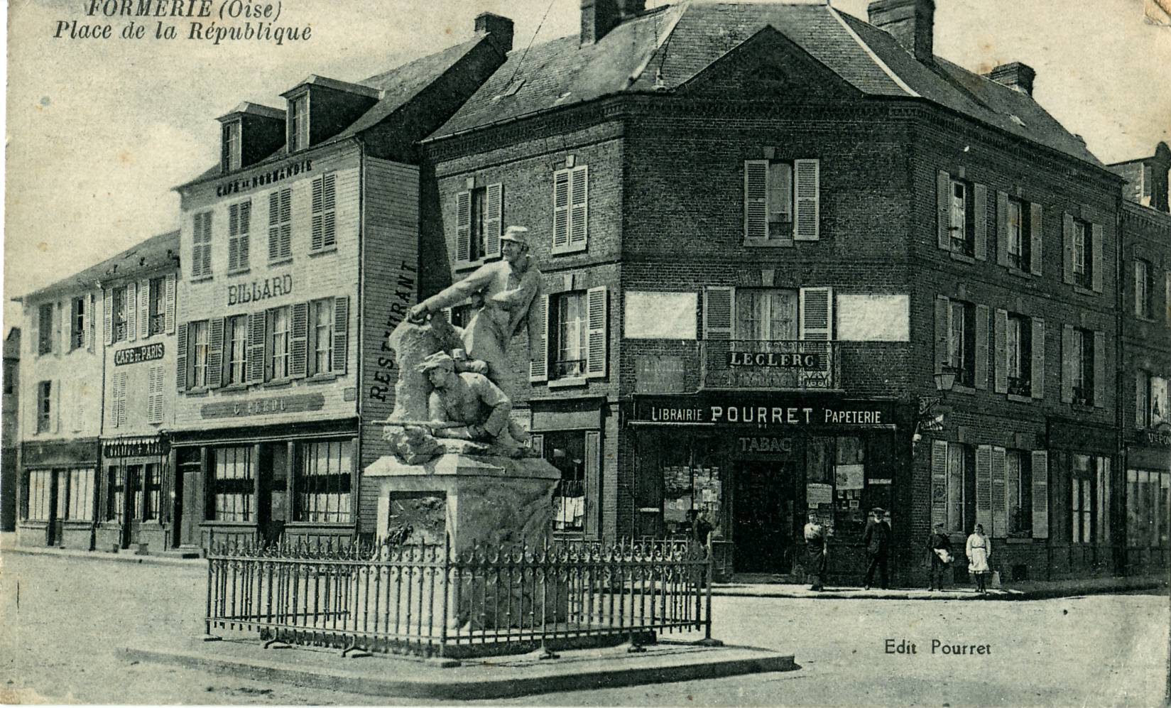 Carte postale ancienne éditée par Pourret :FORMERIE(Oise) : Place de la République